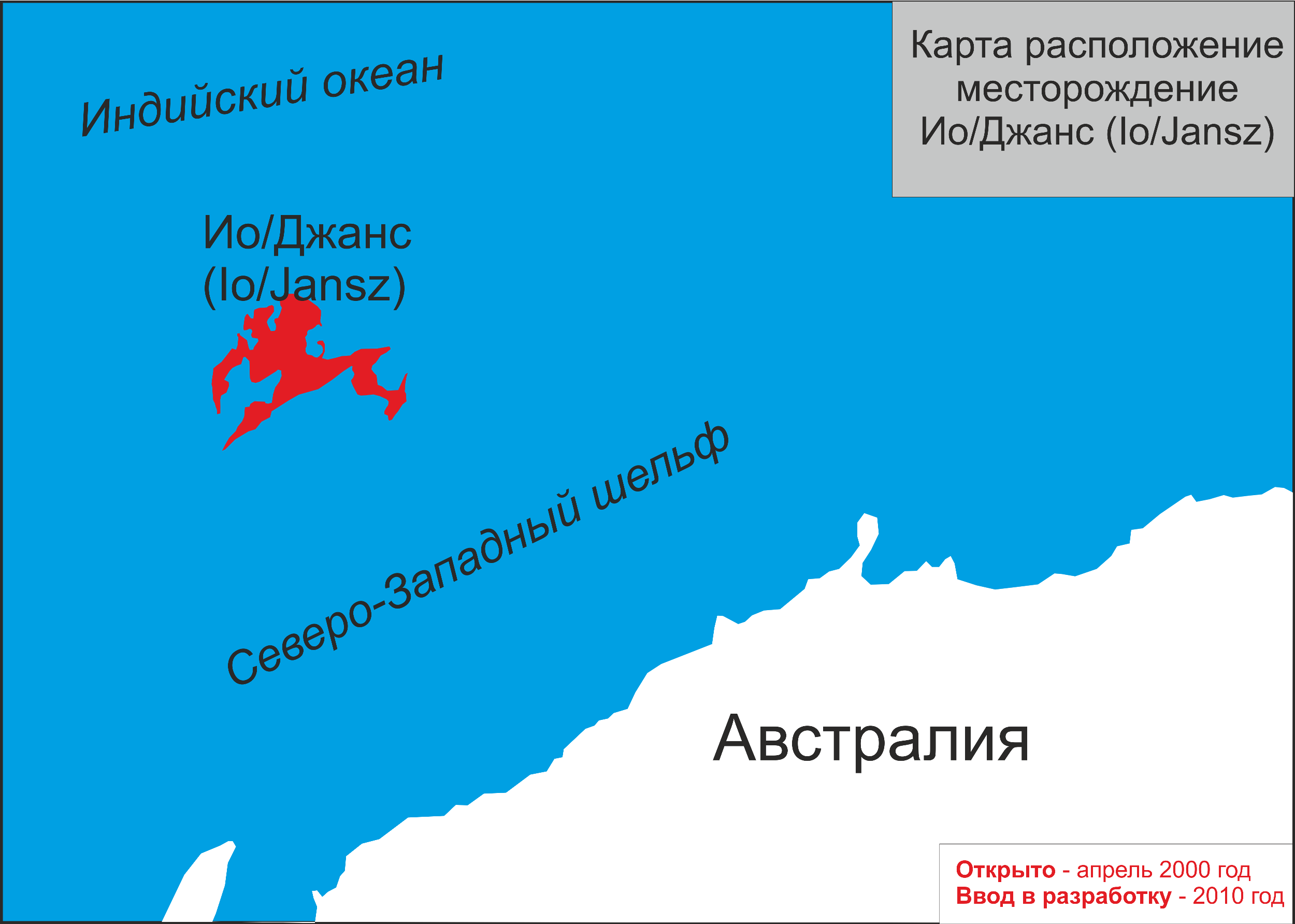 Карта расположение газового месторождения Ио/Джанс в Северо-Западном Австралии